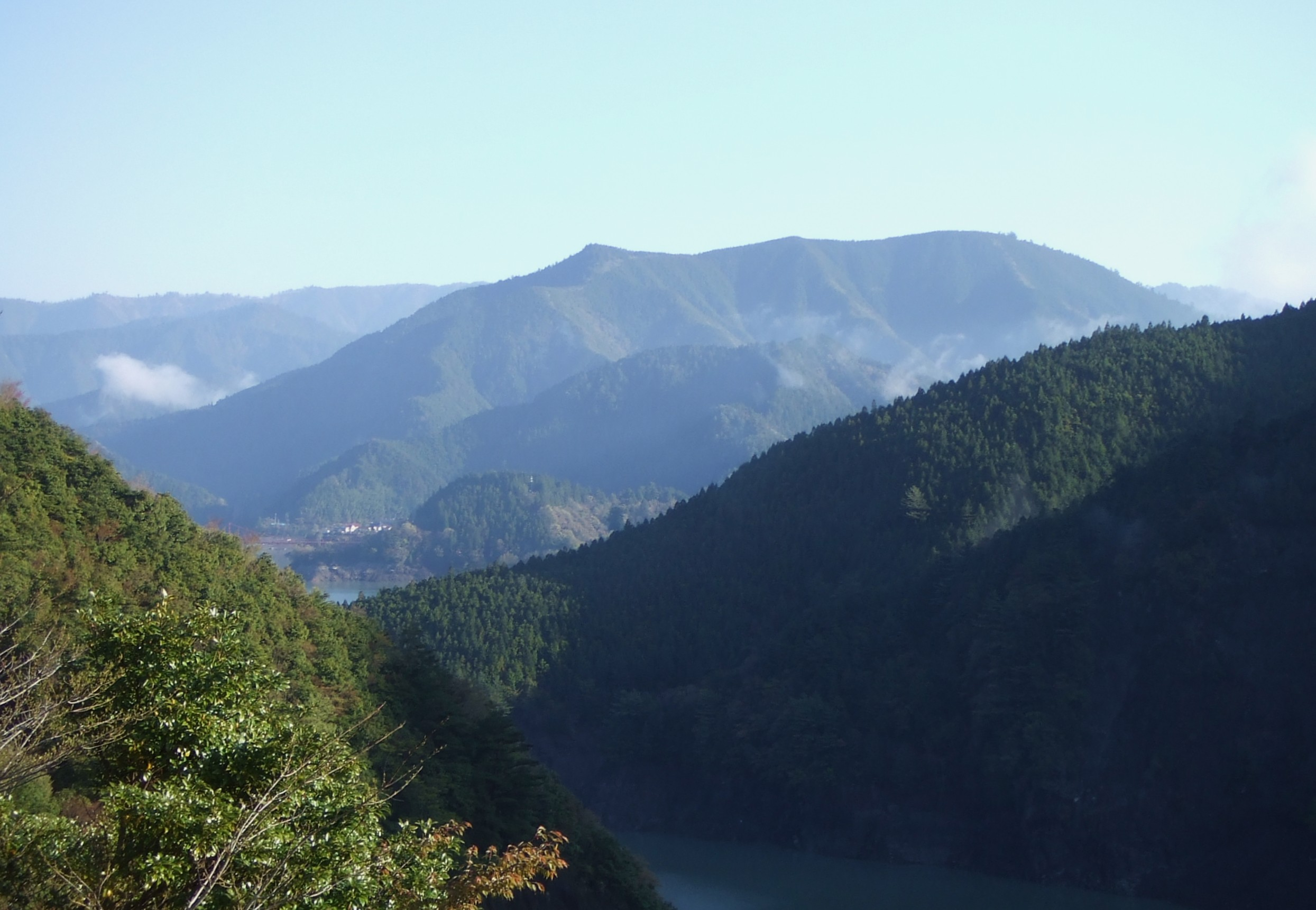 ダムの近くより